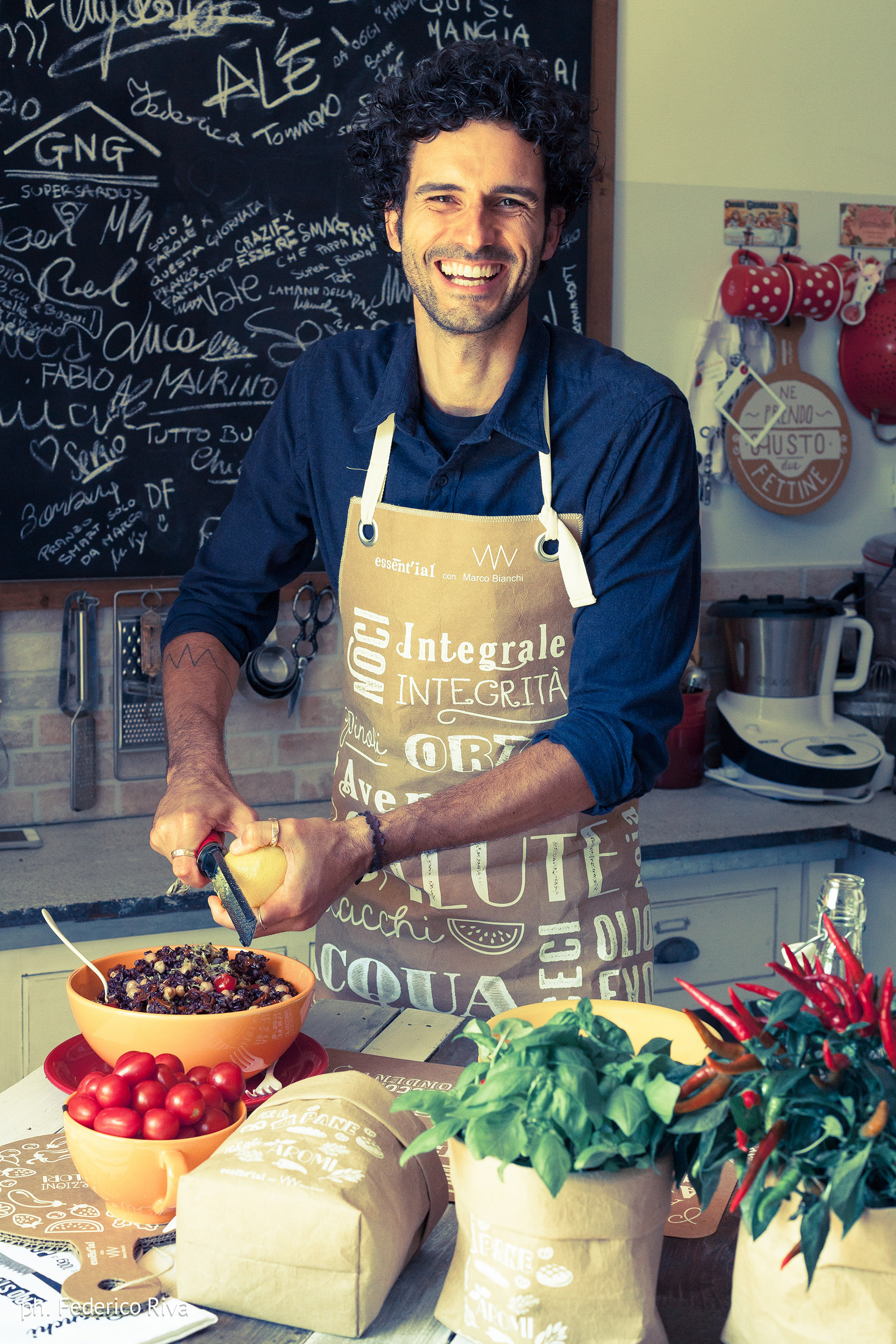 Marco Bianchi in cucina